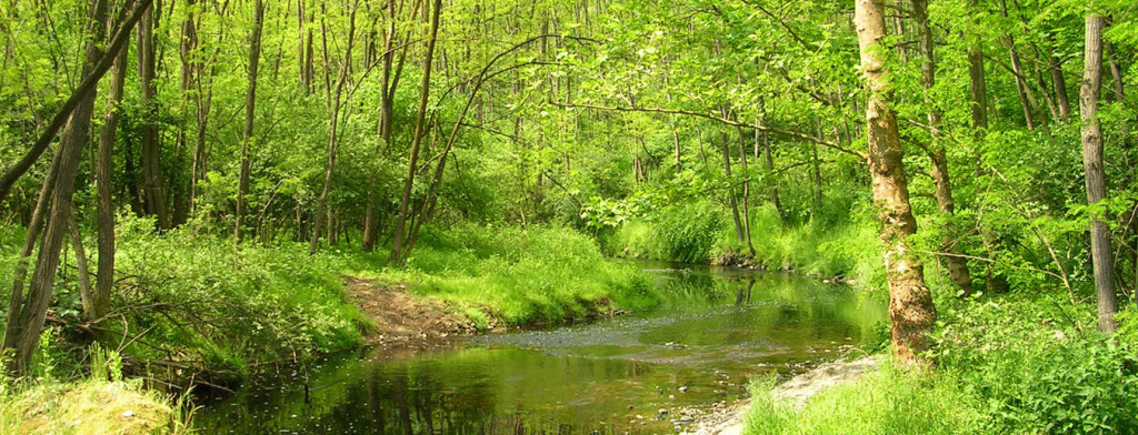 Archivio Consorzio Parco del Lura